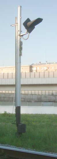 Современный российский повторительный сигнал